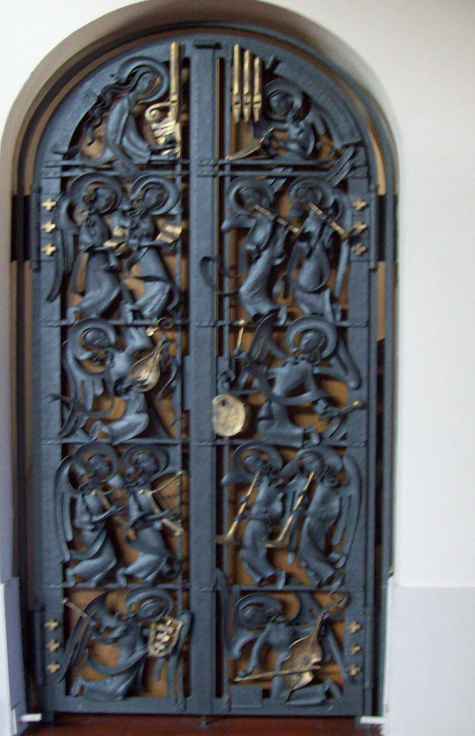 Kapuzinerkirche Aschaffenburg Engelstor von Karl Jung, Donauwörth, Aufgang zur Orgelempore